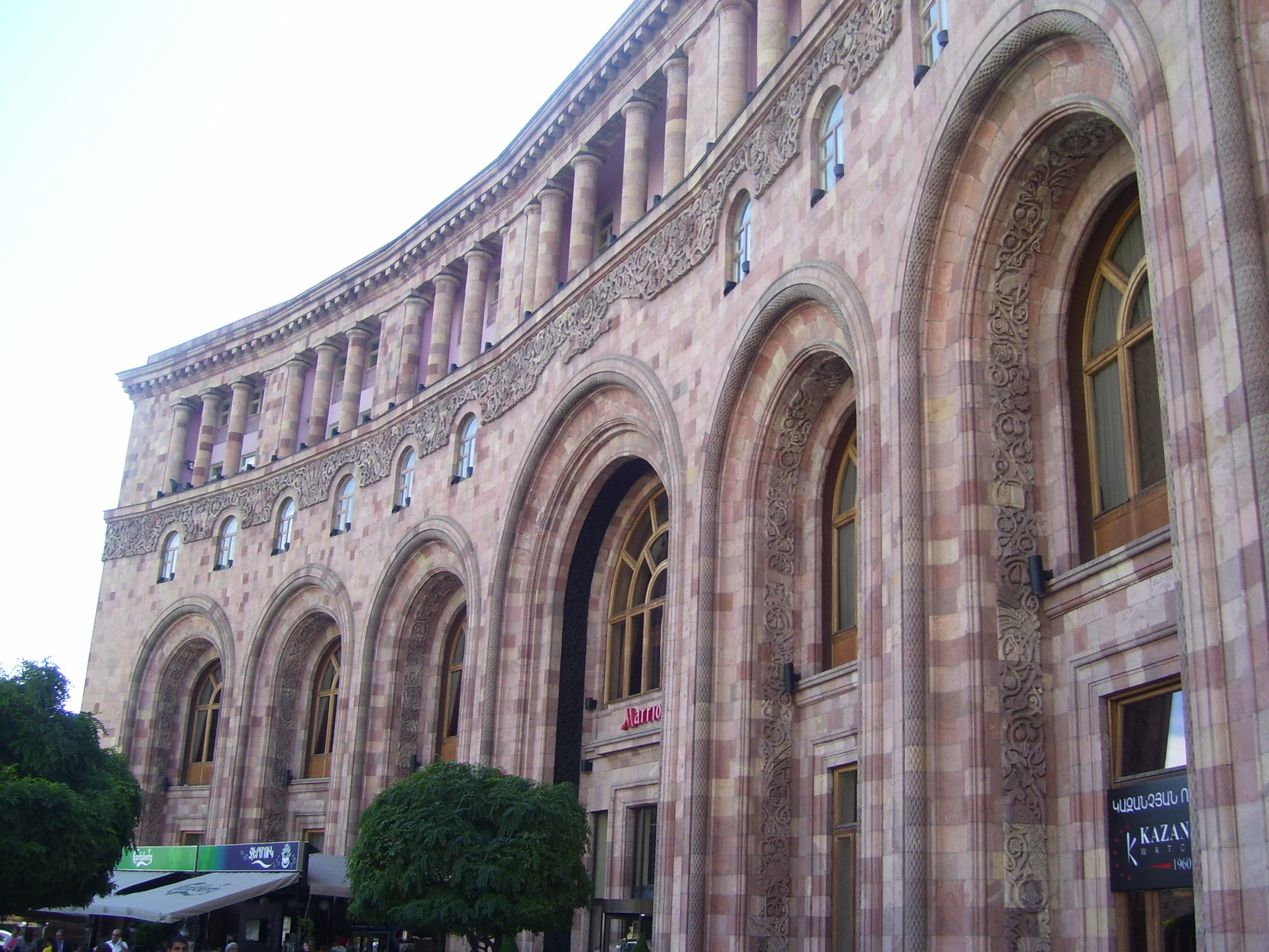 Երևան, Հյուրանոց «Արմենիա» 1958 թ., Ճարտ.` Մ. Գրիգորյան, է. Սարապյան 6/96.1